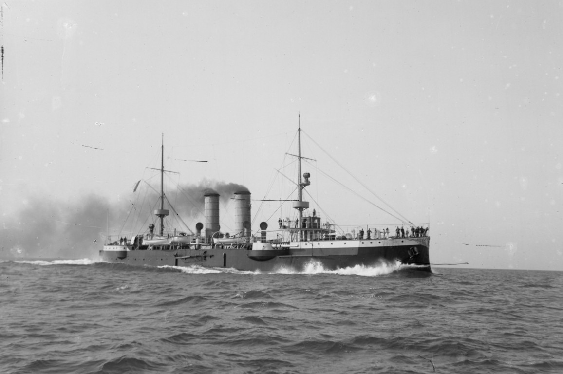 Nave da battaglia "Vasco Da Gama", 1903 (AS Livorno, Archivio storico del Cantiere navale Luigi Orlando)